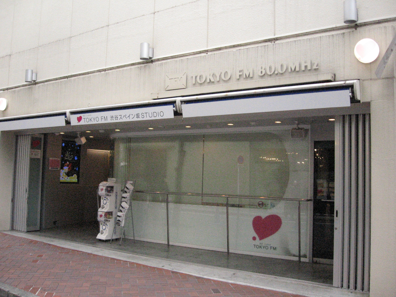 TOKYO FM Spain-zaka studio from Shibuya, Tokyo.